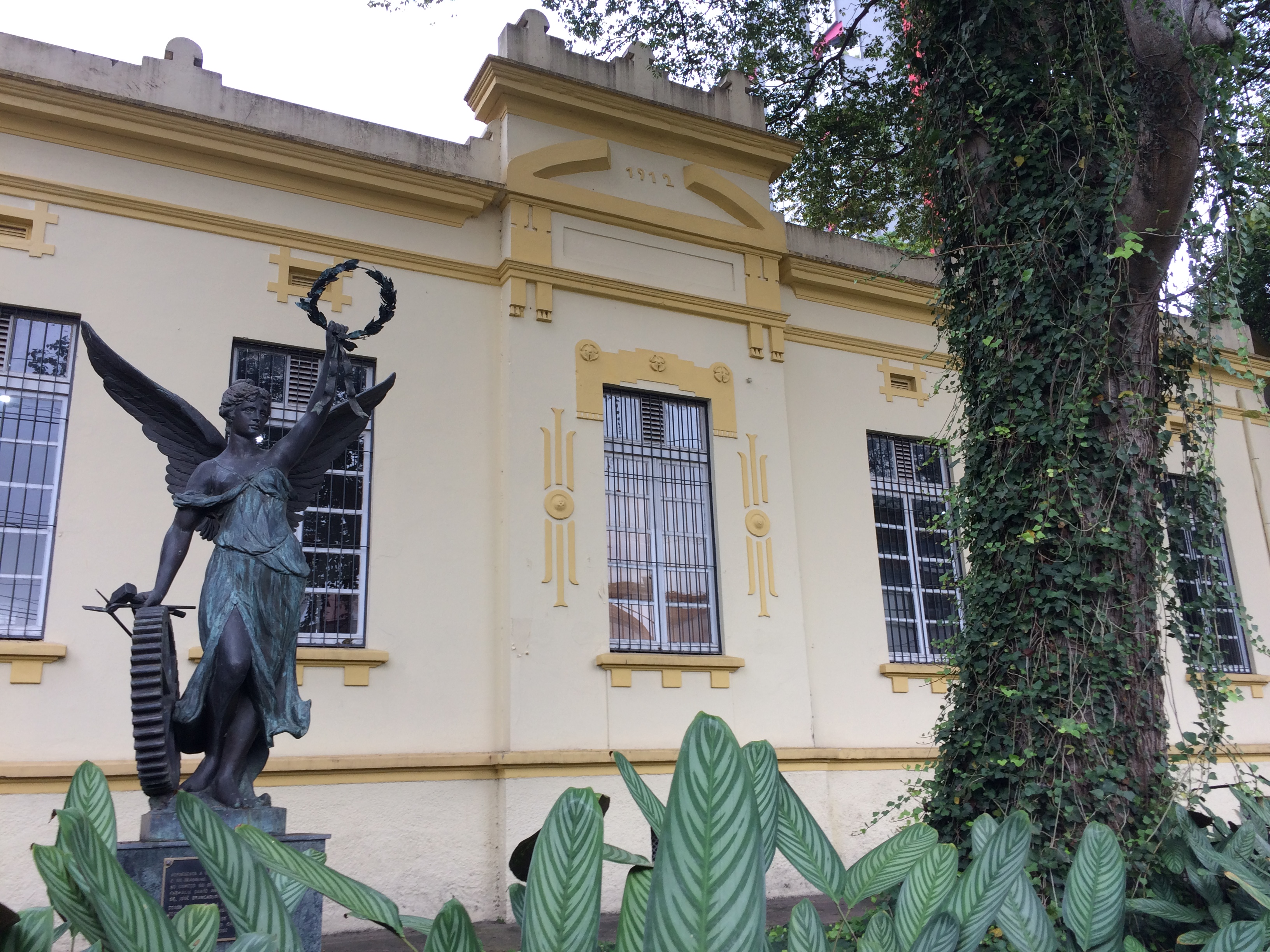 Detalhes da fachada do Museu de Santo André Dr. Octaviano Armando Gaiarsa, em Santo André (SP), Brasil, incluindo o ano em que começou a ser construído esculpido no topo da arquitetura do Museu.